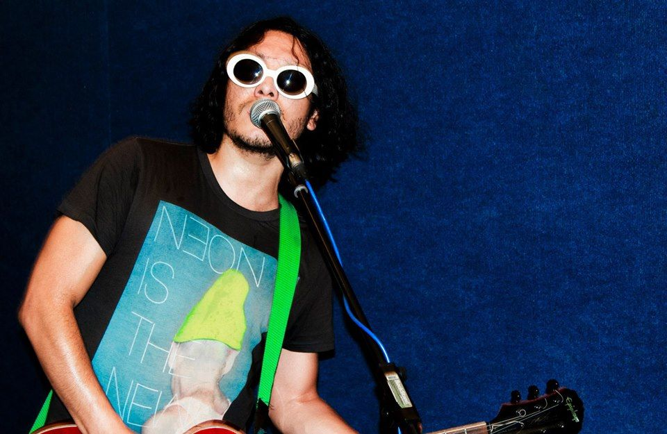 El musico Ricardo Silva Gonzales, en Salamanca, España